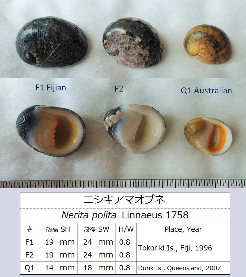 フィジーのトコリキ島とオーストラリアのダンク島でひろった貝殻。